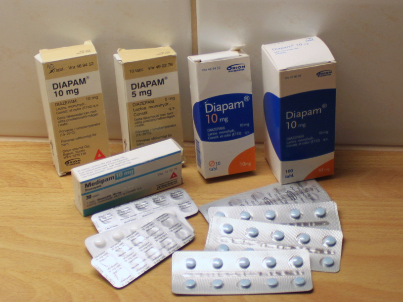 Diatsepaamiin perustuvia lääkkeitä